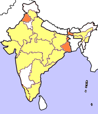 Lok Sabha 1999. Gjord av Soman.